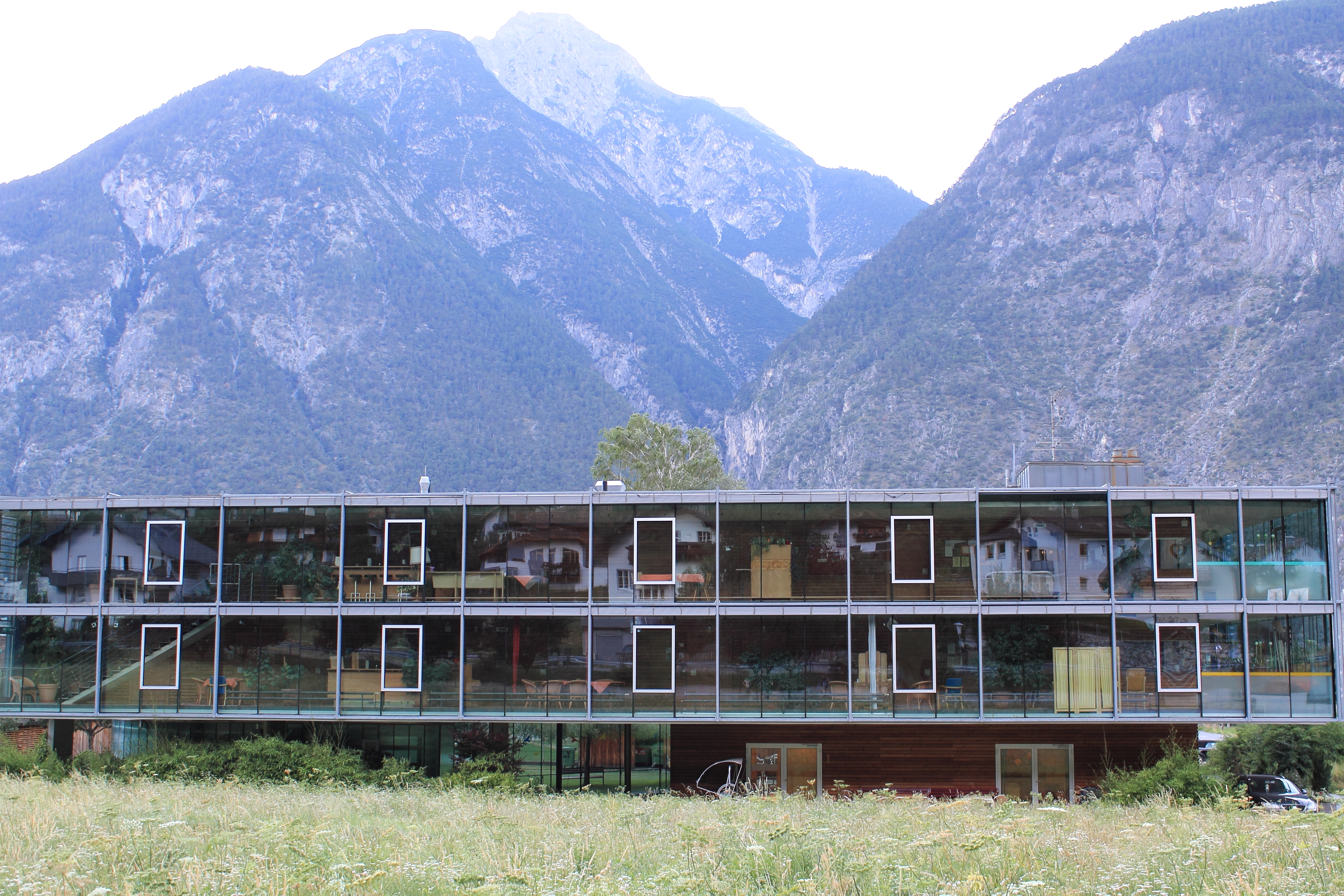 Seniorenzentrum Zams-Schönwies, erbaut 1995/96, Architekt: Johann Obermoser This media shows the remarkable cultural object in the Austrian state of Tyrol listed by the Tyrolean Art Cadastre with the ID 30919. (on tirisMaps, pdf, more images on Commons, Wikidata)